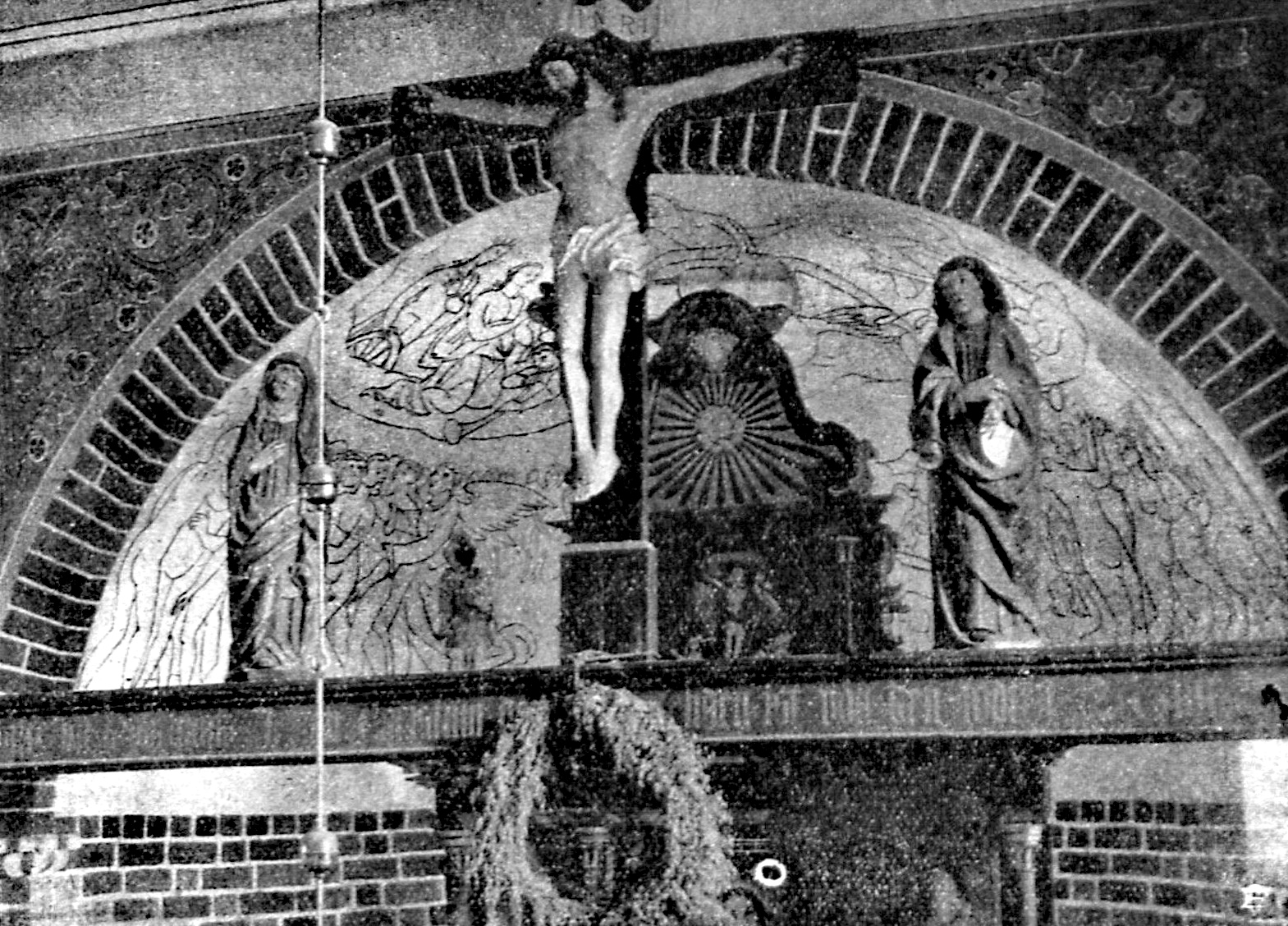 Die aufgefundenen mittelalterlichen Deckengemälde in der Apsis der Kirche zu Rensefeld.